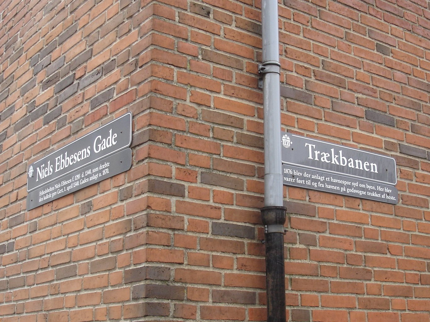 Aalborgs første havnebane fra 1875 mindes med gadenavnet "Trækbanen", dog med fejlagtigt årstal 1876. Banen passerede hvor gaden nu krydser Niels Ebbesens Gade